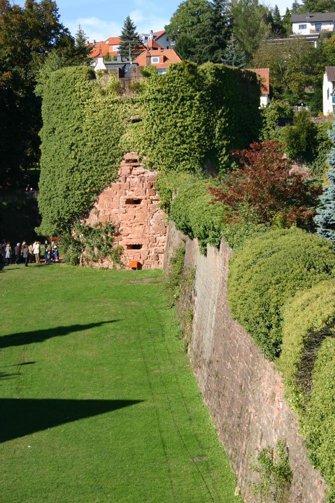 Beschreibung: Untertor in Büdingen Blick zum großen Bollwerk Ursprung: Selbst fotografiert von Sven Teschke am 10. Oktober 2004 Lizenzstatus: GNU FDL